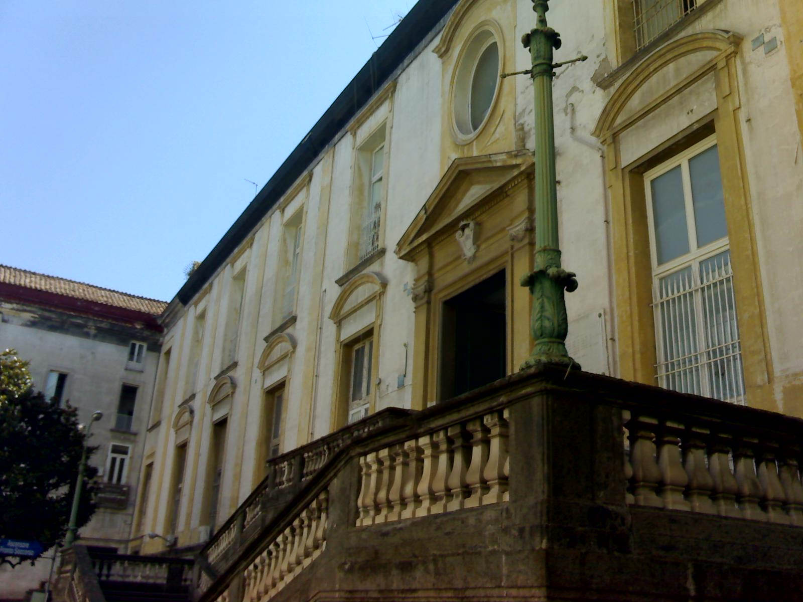 Complesso degli Incurabili di Napoli - L'ospedale